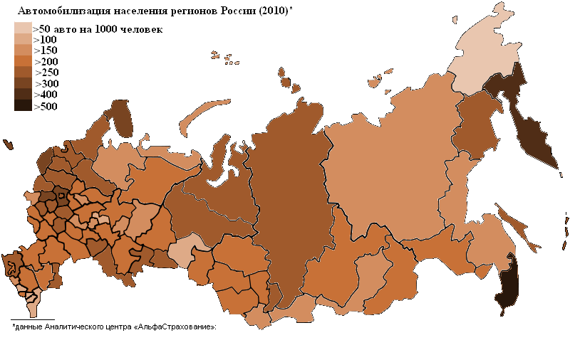 Автомобилизация населения регионов России в 2010 году, авто/1000 чел. Данные Аналитического центра компании "Альфастрахование"